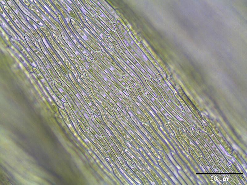 Gelbliches Seidenmoos (Homalothecium lutescens), Laminazellen, Vergrößerung: 400x